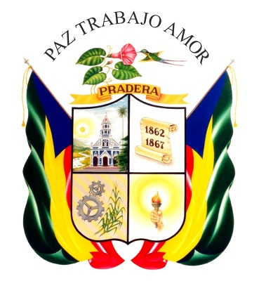 Escudo de armas del pueblo tiene la bandera de pradera y la iglesia en la parte franja 4